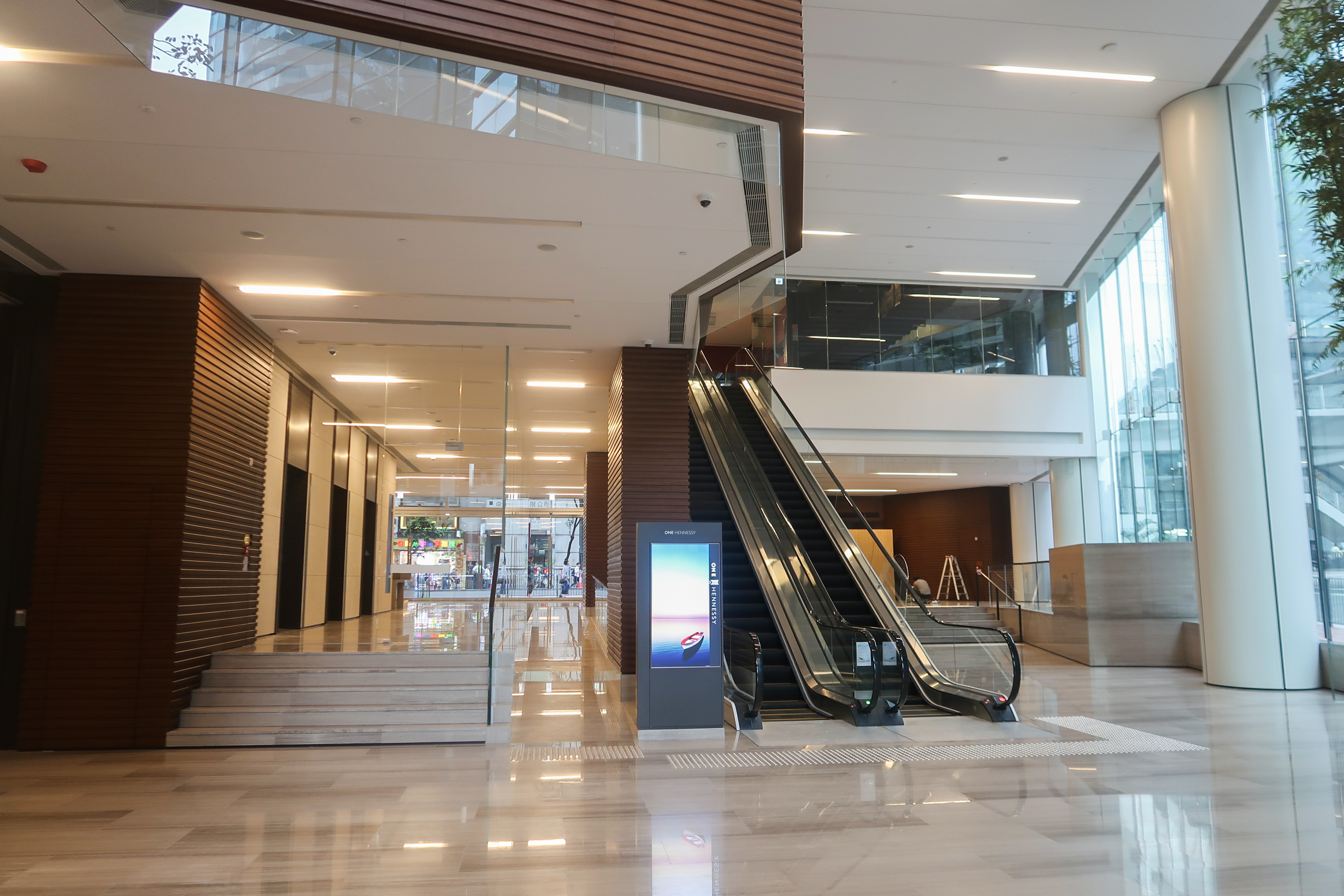 One Hennessy Lobby